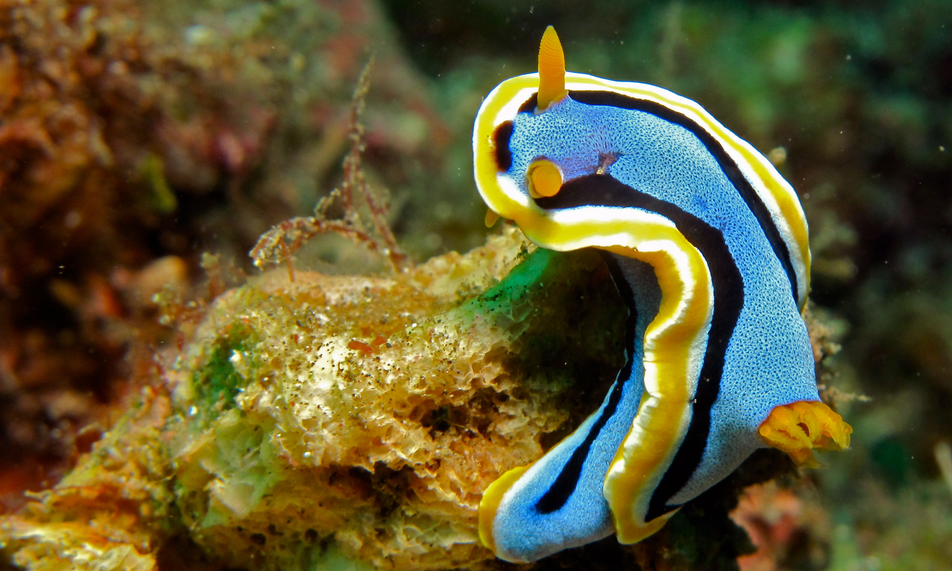 Makawide, Lembeh Strait, Sulawesi, INDONESIA